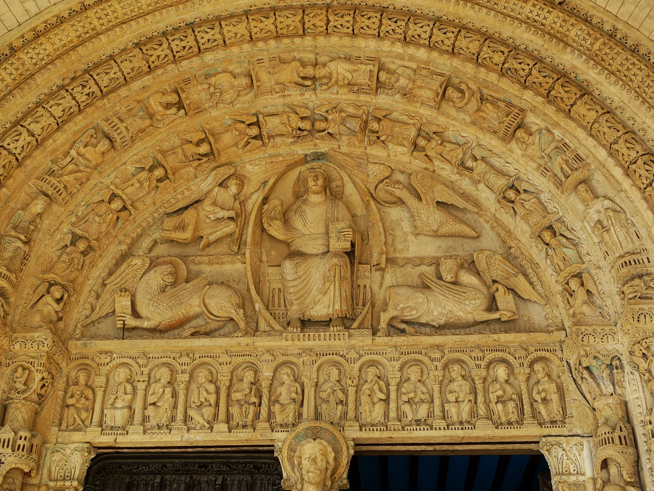 Südprotal der Kathedrale von Bourges: Tympanon mit Christus in der Mandorla in der Pose des Pantokrator (rechte Hand verloren), umgeben von den allegorischen Abbildungen der vier Evangelisten Johannes, Lukas, Markus, Johannes (im Uhrzeigersinn)